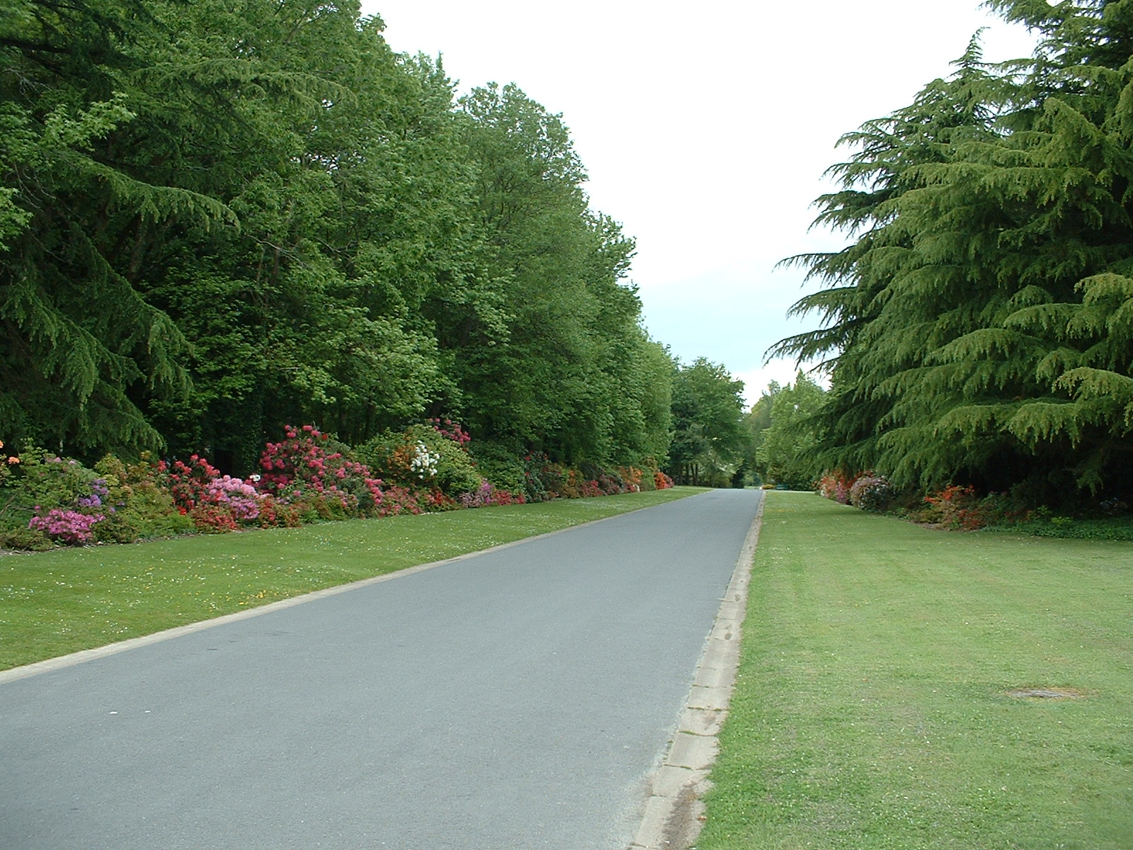 Nantes (France) - Cimetière Parc - Allée bitumée